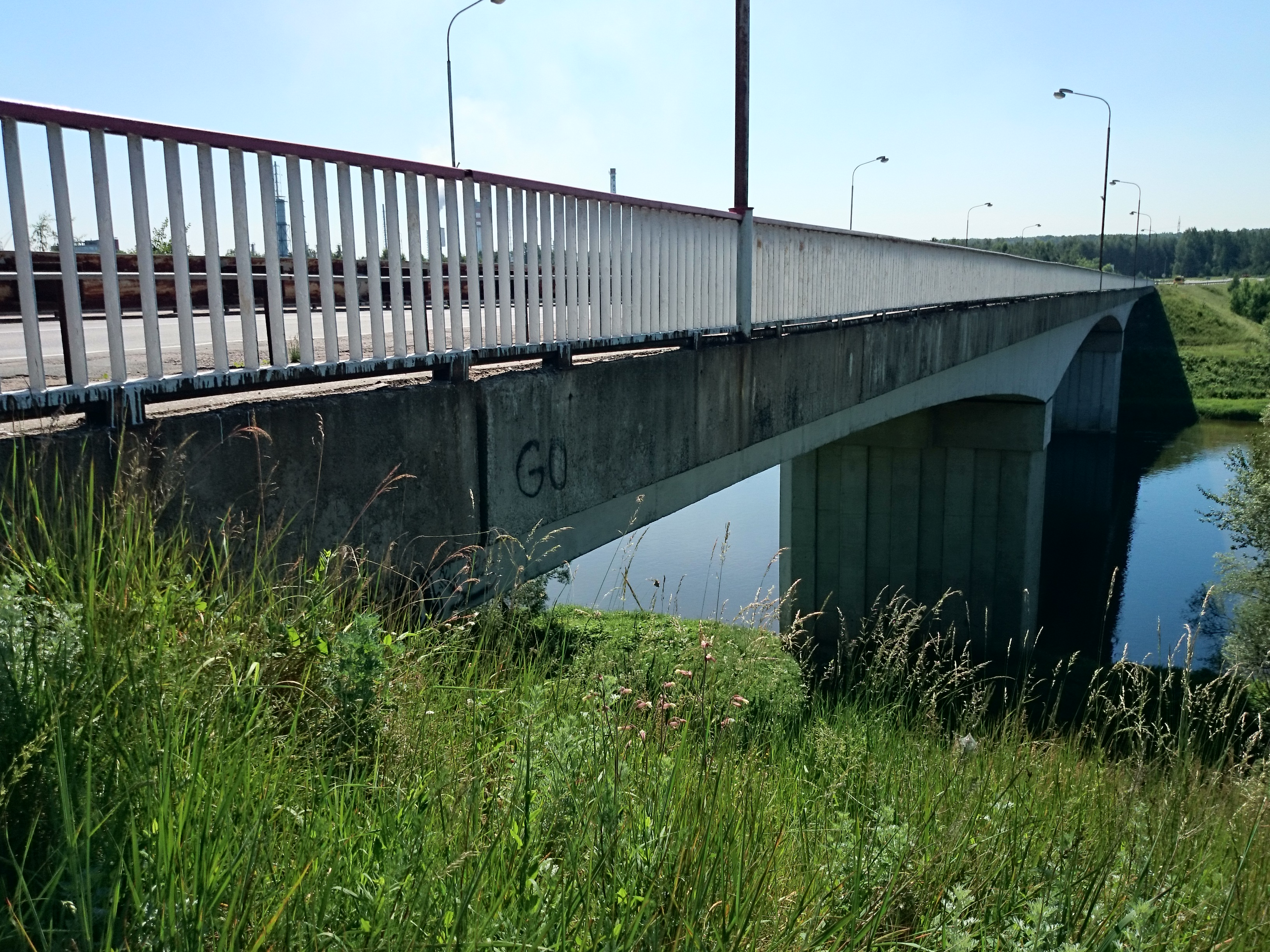 Taurosta bridge